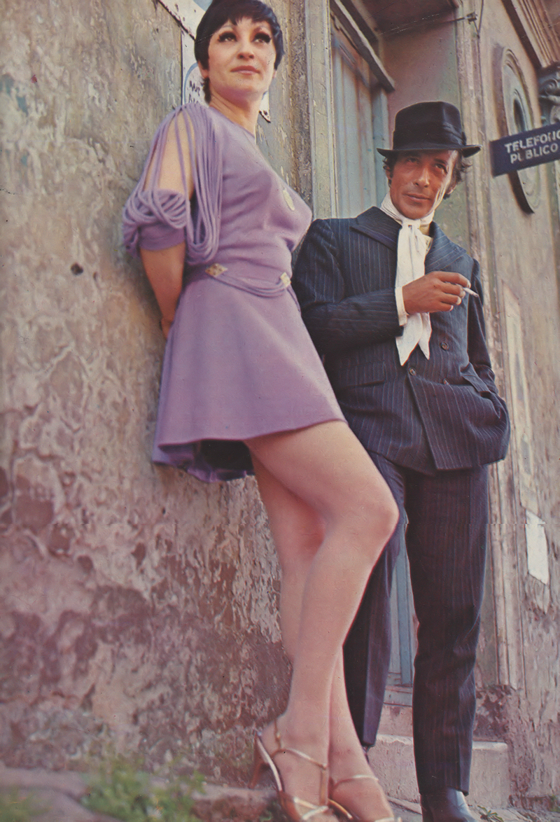 Los bailarines de tango argentino Juan Carlos Copes y María Nieves, Revista Gente y la Actualidad, 1970.